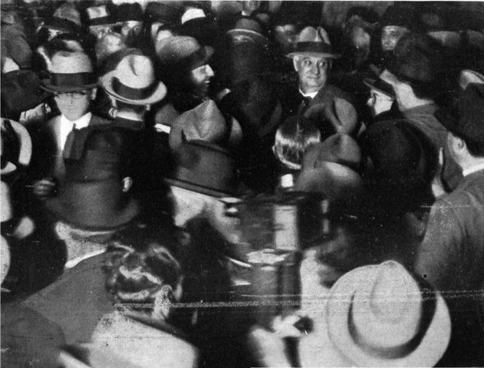 El ex presidente intenta atravesar la multitud para llegar al automóvil que lo espera "Con la situación aparentemente controlada, seis meses después del golpe, Uriburu convocó a una seguidilla de elecciones para designar autoridades provinciales. Sin embargo, en la primera de ellas realizada en la provincia de Buenos Aires el 5 de abril de 1931, para sorpresa del gobierno, ganó el ex canciller Honorio Pueyrredón, hombre muy cercano de Yrigoyen. Uriburu anuló de inmediato las elecciones. Inicialmente existía la posibilidad de que el gobierno provisional de Uriburu encontrara en Alvear la salida política que estaba buscando. El 25 de abril de 1931 Alvear, quien tenía su residencia en París, volvió al país y se entrevistó con el dictador José Félix Uriburu, antiguo amigo personal. Sin embargo, poco a poco, la posibilidad de que Alvear fuera apoyado por la dictadura como el próximo presidente se fue desvaneciendo..."